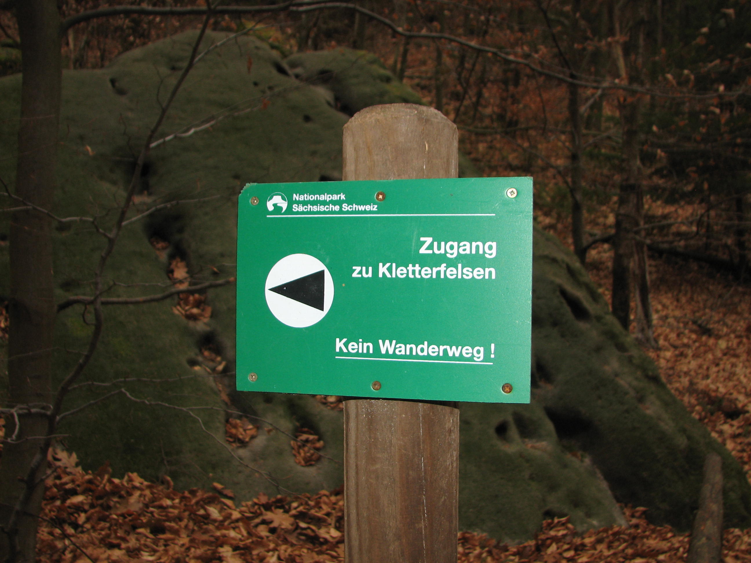 Hinweistafel auf einen Klettersteig an den Schrammsteinen